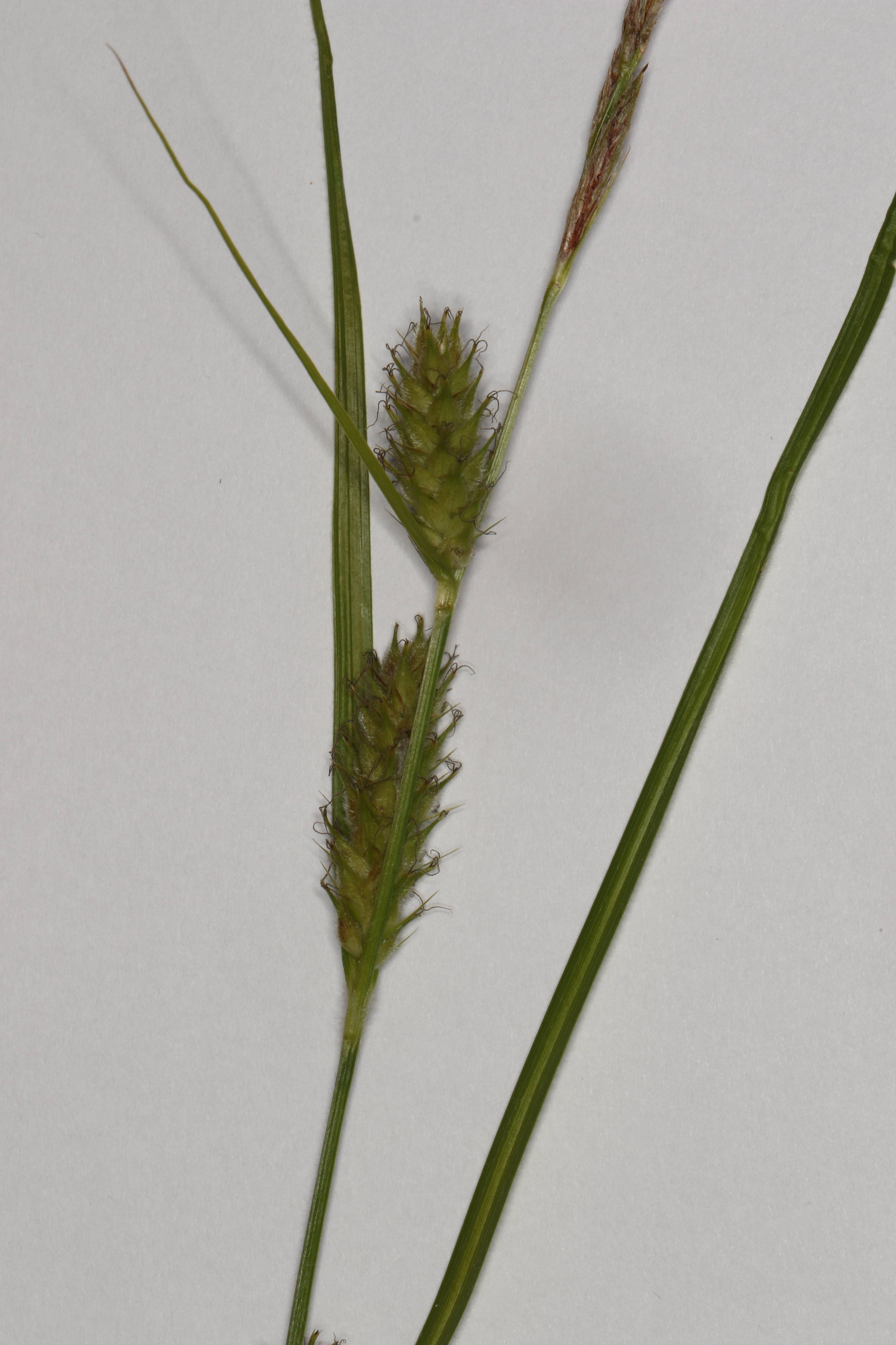 Carex hirta L., Utterslev Mose, Søborg, Denmark, 5 June 2016